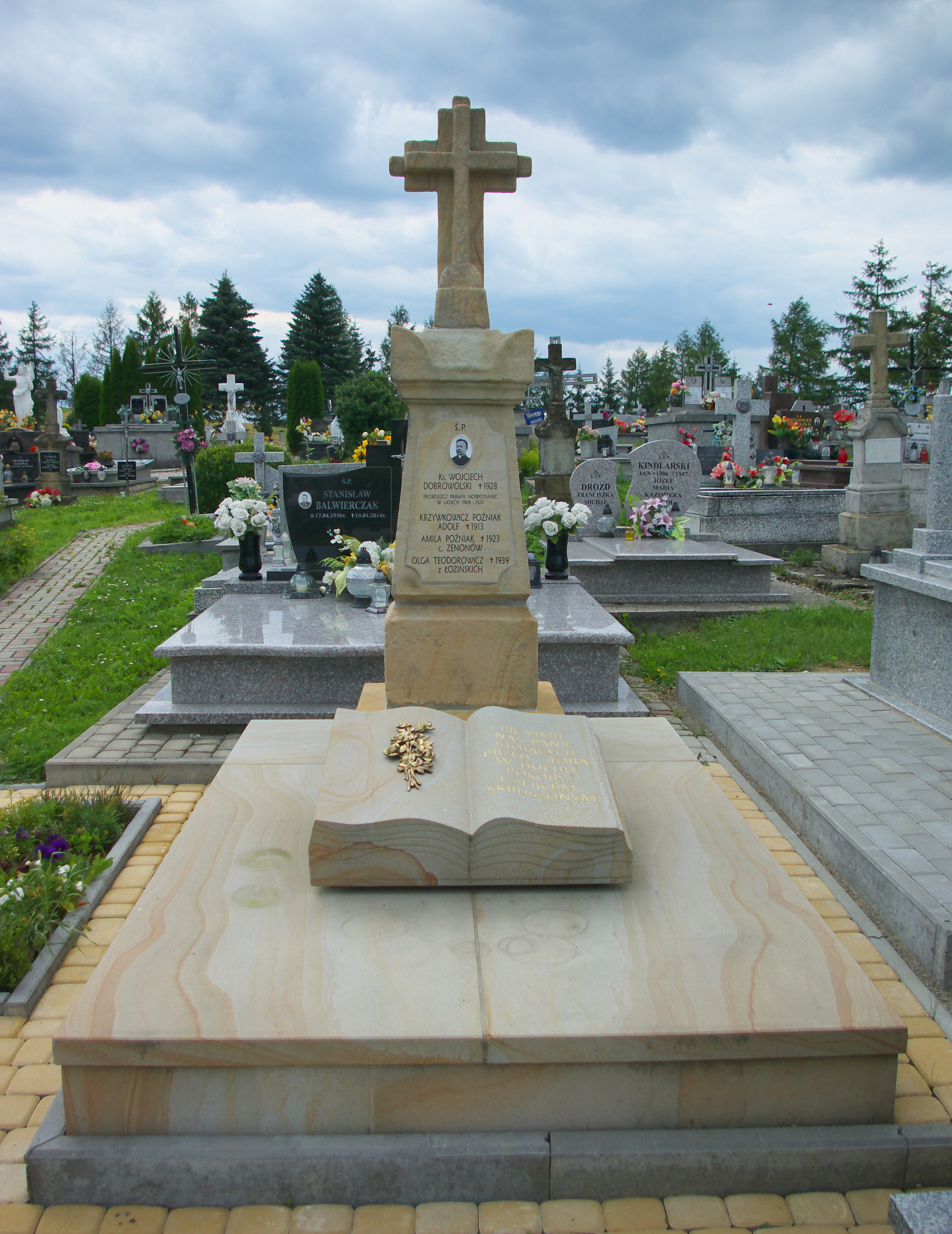 Nagrobek Adolfa i Amili Poźniak, ks. Wojciecha Dobrowolskia i Olgi Teodorowicz z Łozińskich na Cmentarzu w Nowotańcu.